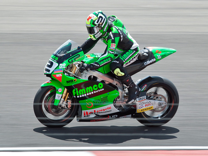 gabor talmacsi